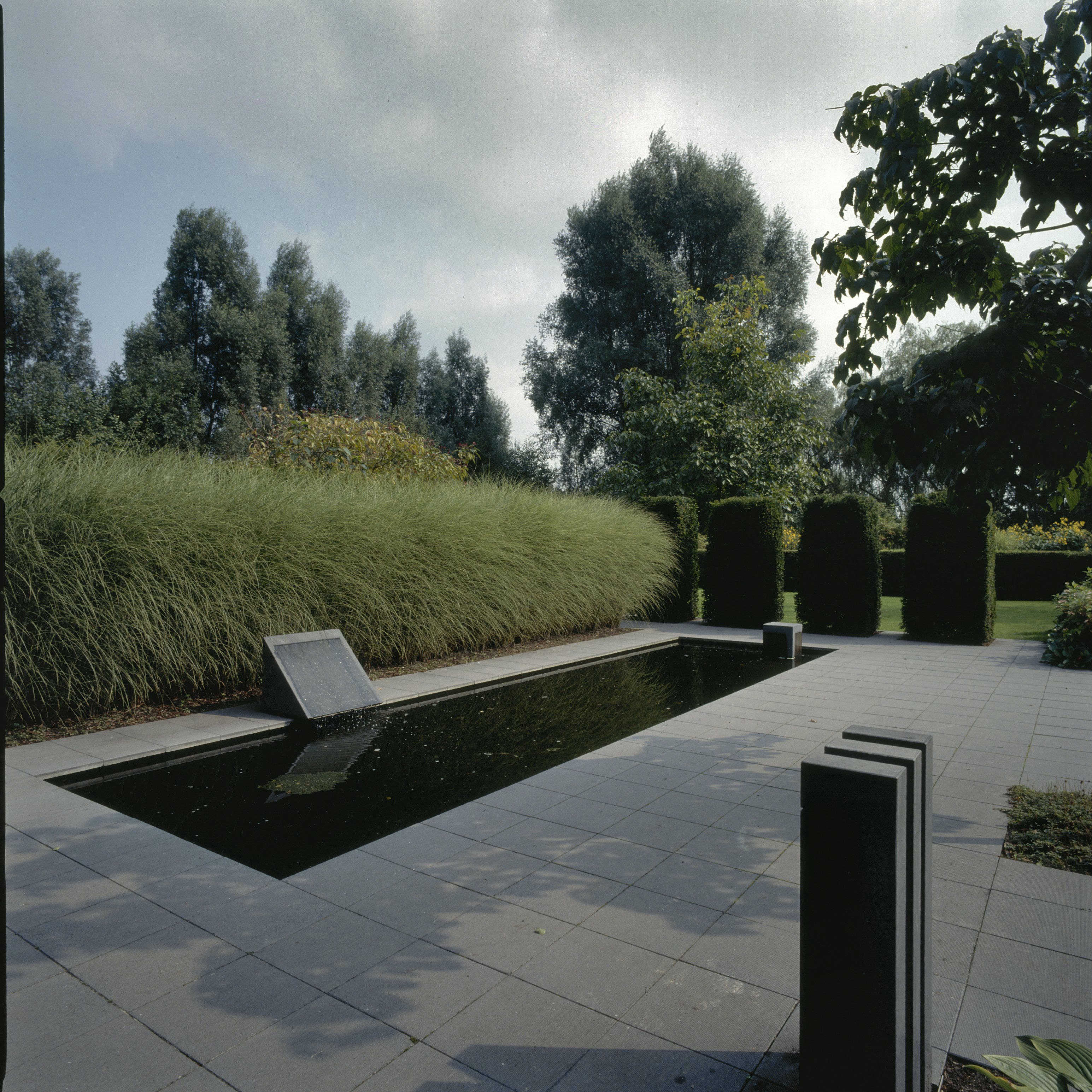 De tuinen van Mien Ruys: Overzicht van de geknipte tuin uit 1999